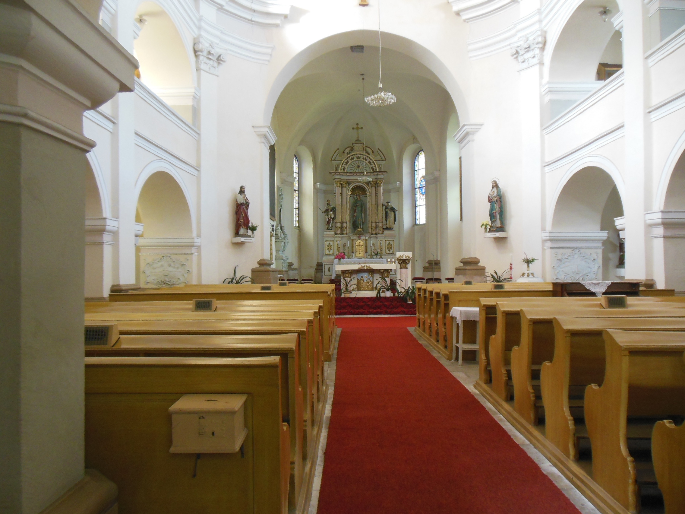 Sloup v Čechách (okres Česká Lípa). Náměstí T. G. Masaryka, interiér kostela svaté Kateřiny Alexandrijské.